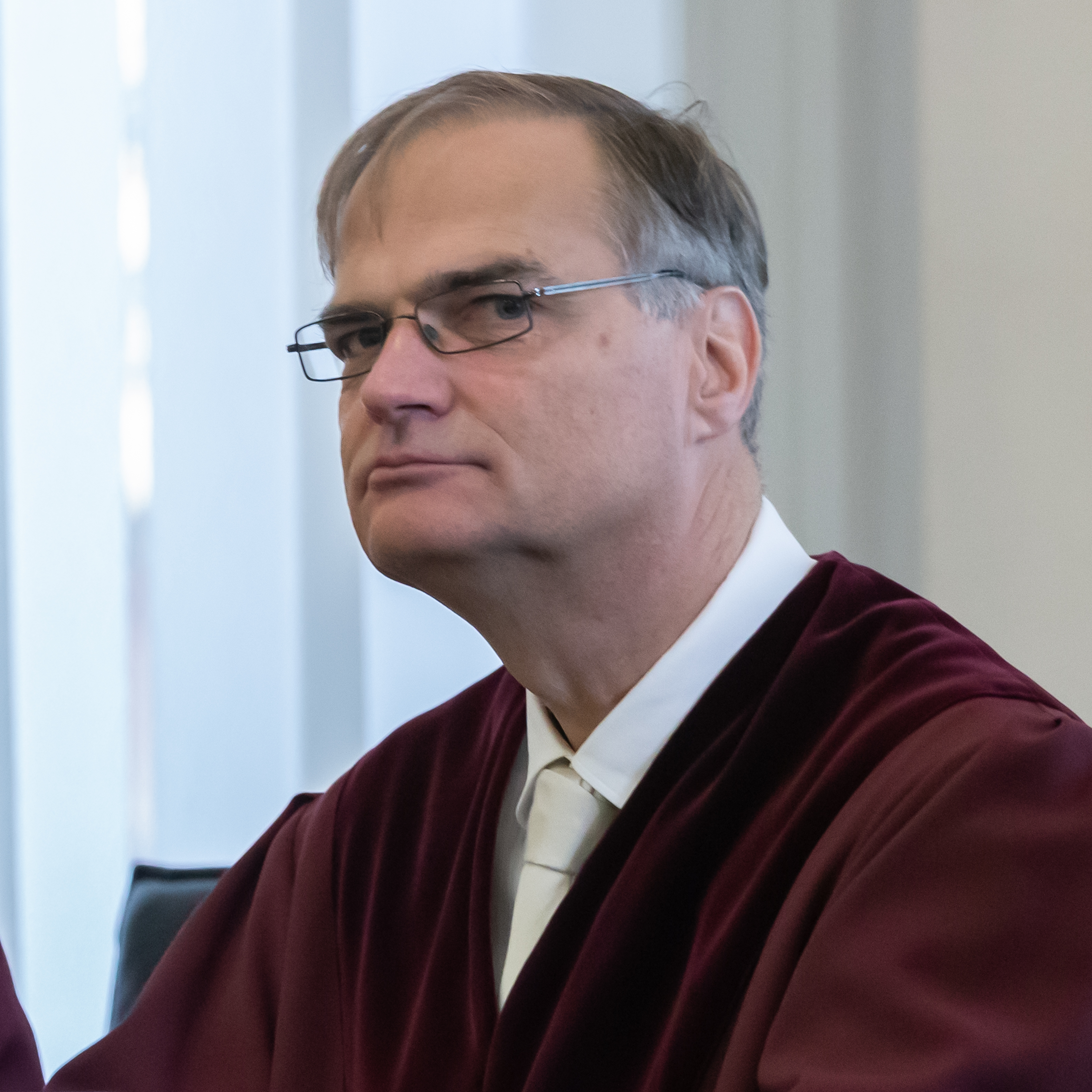 BGH Verhandlungstermin am 31. Oktober 2018 in Sachen I ZR 104/17 (Bundesgerichtshof zur Veröffentlichung von Abbildungen gemeinfreier Kunstwerke): Prof. Dr. Wolfgang Kirchhoff, Richter am Bundesgerichtshof; Porträt, Einzelbild